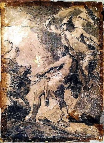 Mythological Sketch of Hercules, Cerberus and Mercury by Gaetano Gandolfi.jpg (Малюнок до міфологічної композиції з зображенням Геркулеса, Цербера та Меркурія)